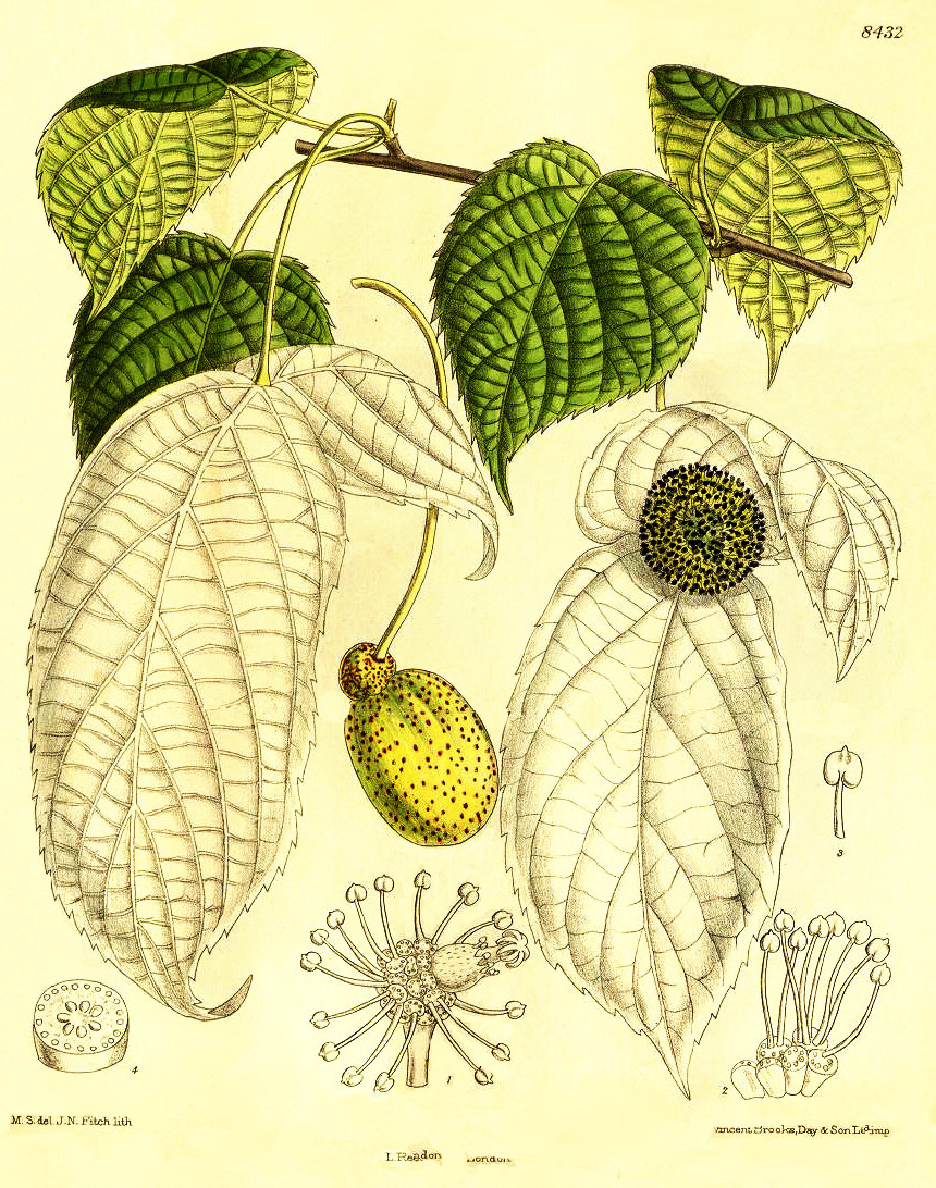 Davidia involucrata var. vilmoriniana, Cornaceae, Nyssoideae